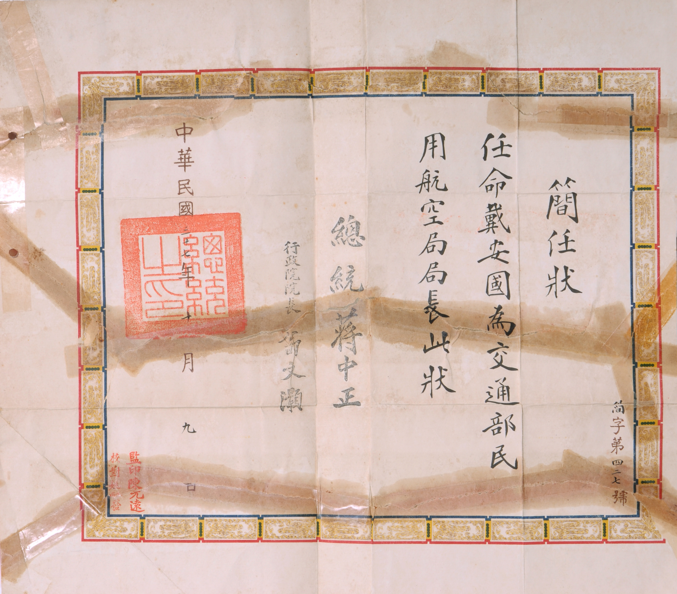 中華民國總統蔣中正任命戴安國擔任交通部民用航空局局長的簡任狀，左方蓋印總統之印。